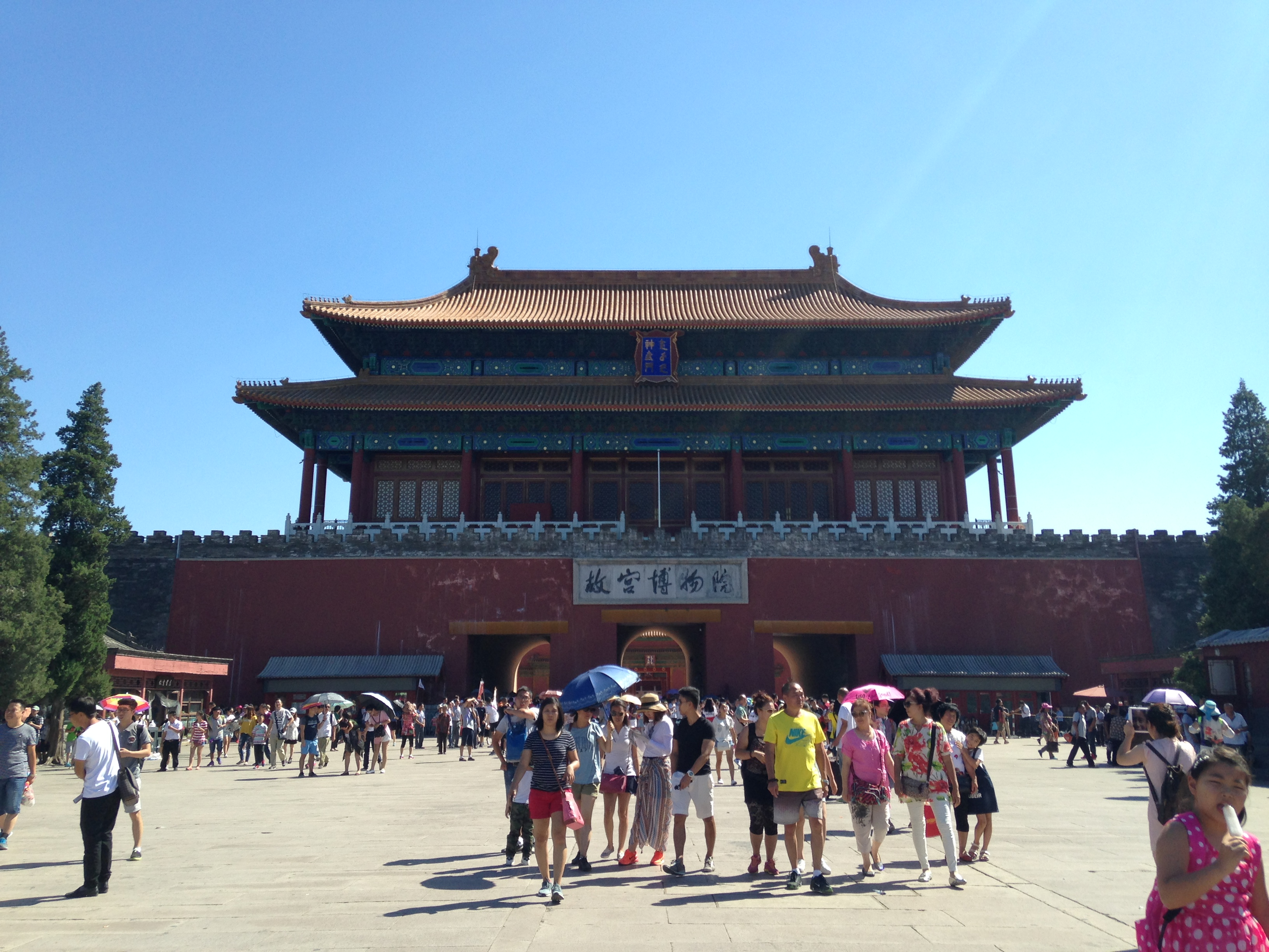 紫禁城・神武門